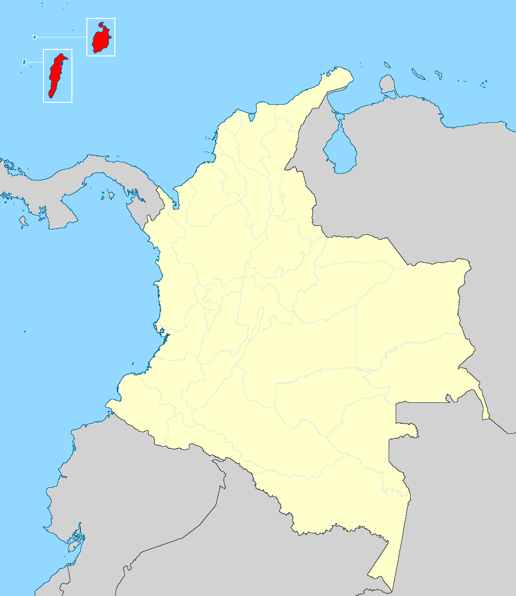 Mapa del departamento de San Andrés y Providencia en Colombia sin Bogotá